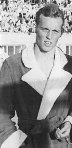 Wolfram Gottfried, DDR-Meister im Schwimmsport, 1952